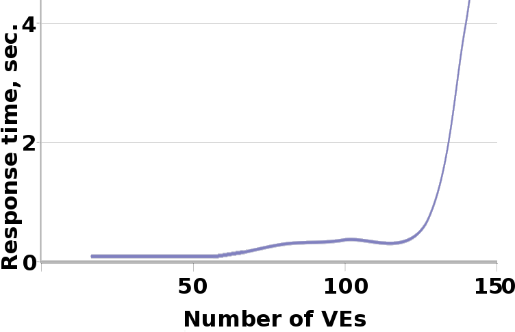 OpenVZ density graph